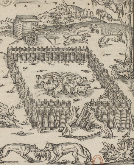 Illustration issue de "La chasse du loup, nécessaire à la maison rustique" par Jean de Clamorgan (1574). Lire en ligne